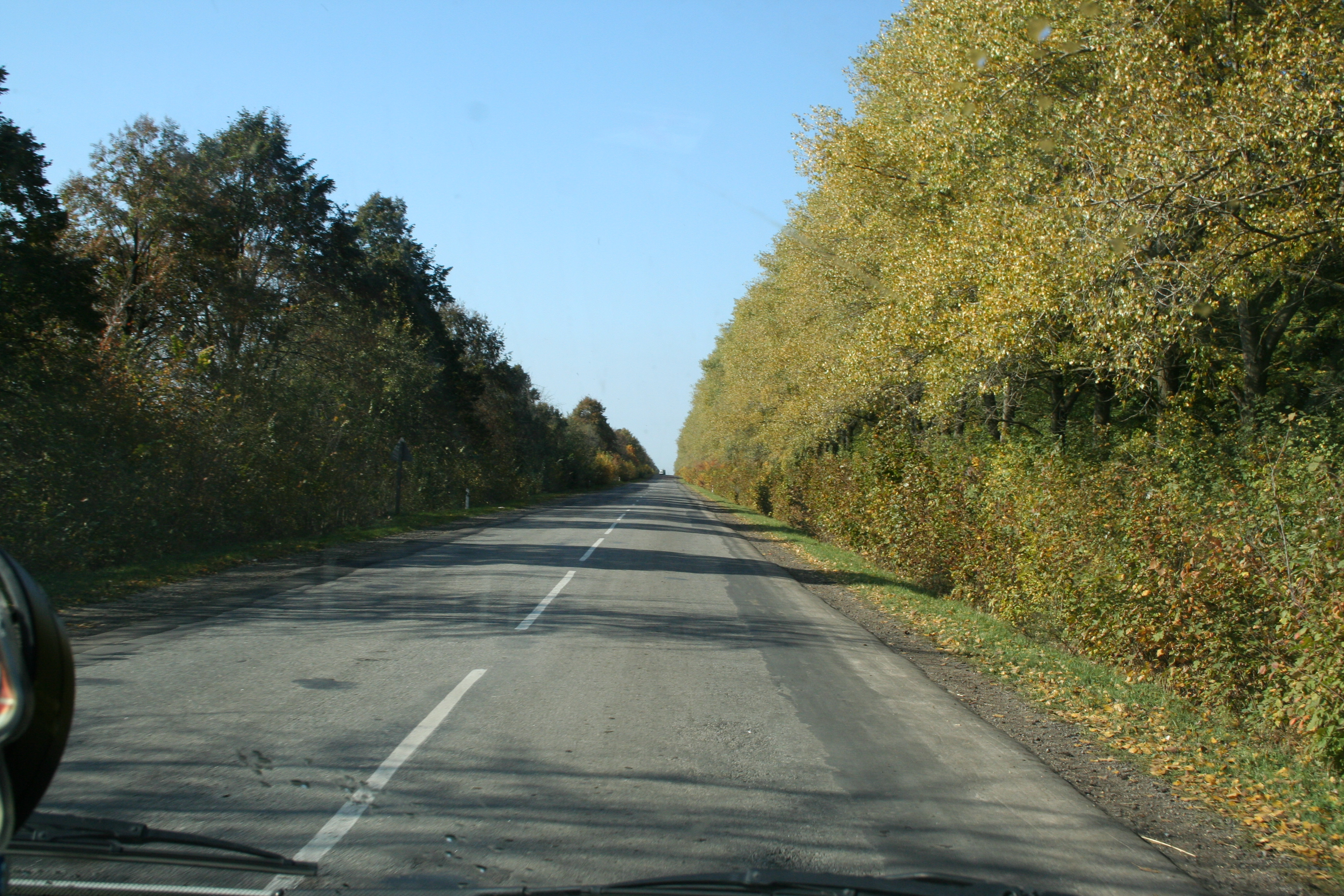 Chmelnyckio sritis